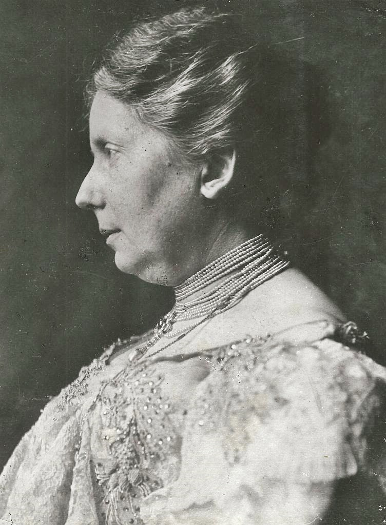 Zsolnay Teréz, Zsolnay Vilmos lánya